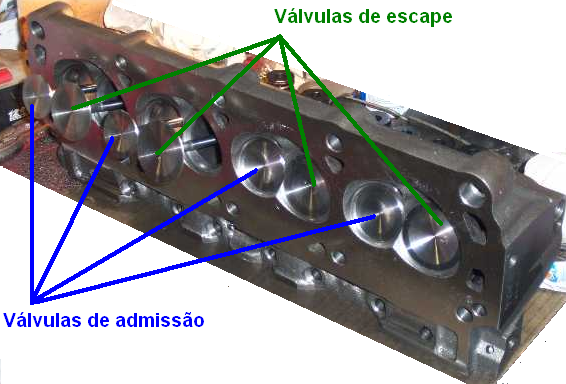 Apresentação de válvulas na cabeça de um motor